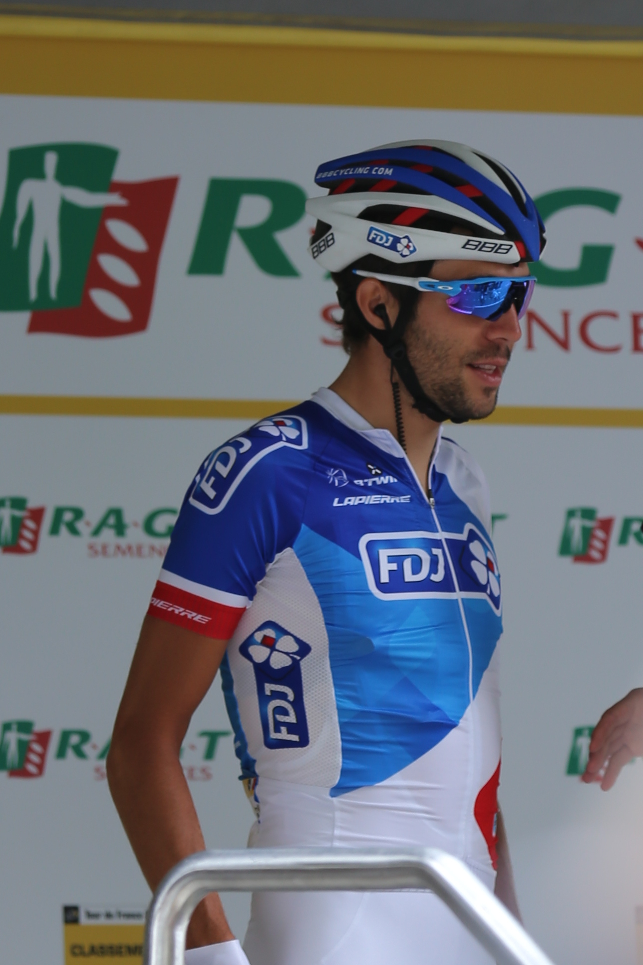 Thibaut Pinot lors du départ de la 8e étape du Tour de France 2015 à Rennes.